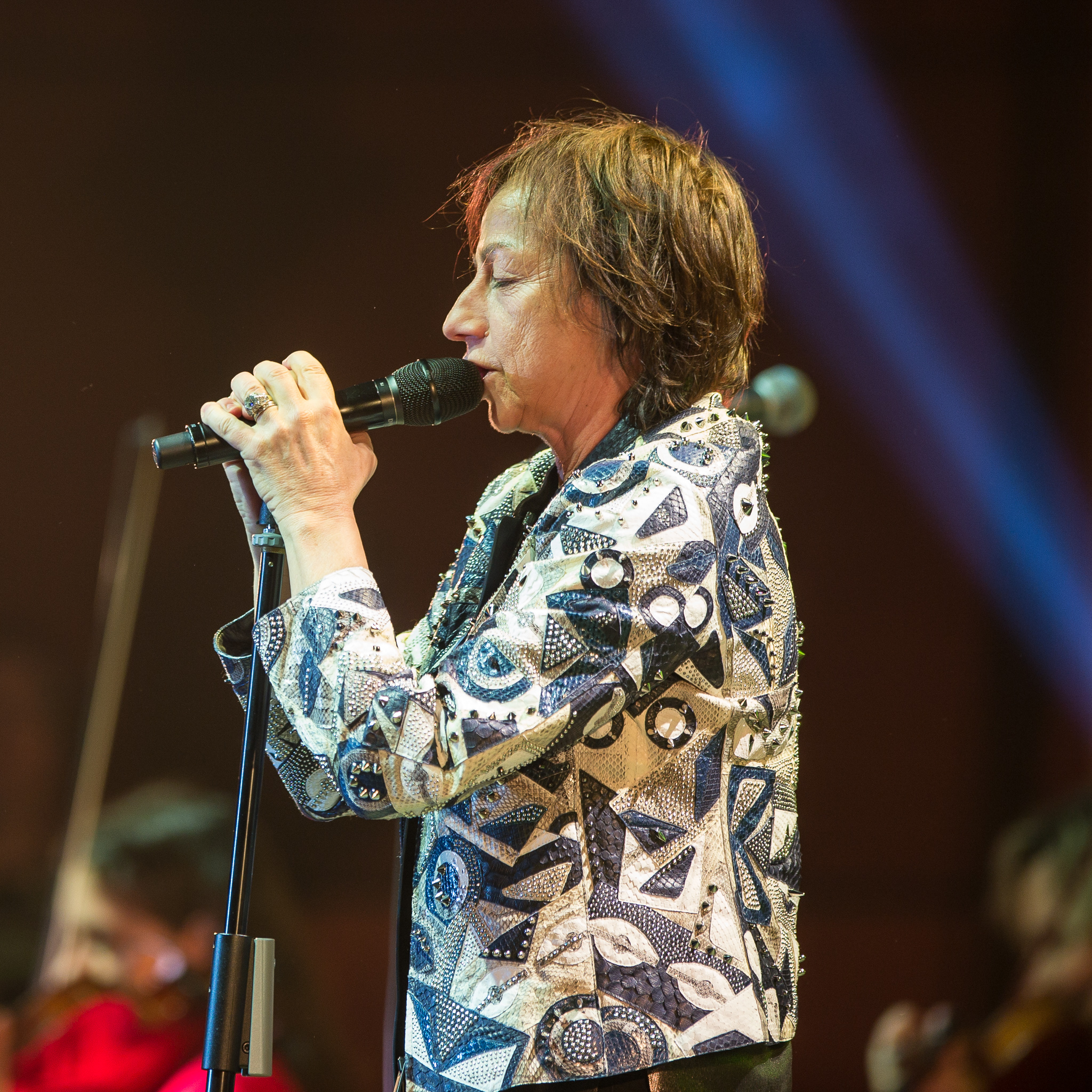 Concertbüro Franken,Gianna Nannini,Hitstory Tour 2017,Konzert,Livekonzert,Livemusik,Meistersingerhalle